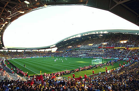 Le stade de la Beaujoire "Louis Fonteneau" à Nantes, lors de la coupe du Monde football de 1998. Reproduction autorisée par la Mairie de Nantes pour Wikipedia